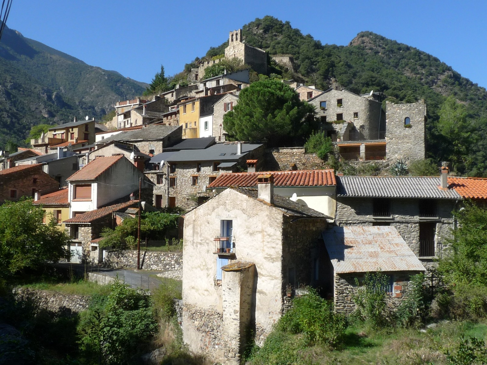 Vue de la partie amont du bourg, Conat , Pyrénées-Orientales, France